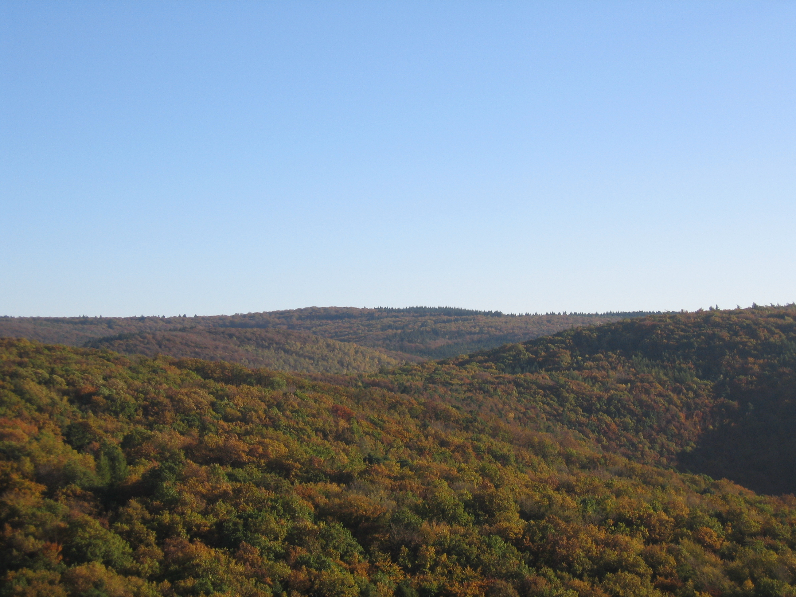 Die unscheinbare Hügelkuppe des Häuschens (ca. 510m ü.NN), betrachtet vom Alfred-Dahm-Turm. Zuvor war der höchste Punkt an seinem Aussichtsturm erkennbar; dieser wurde jedoch Opfer eines Brandanschlags